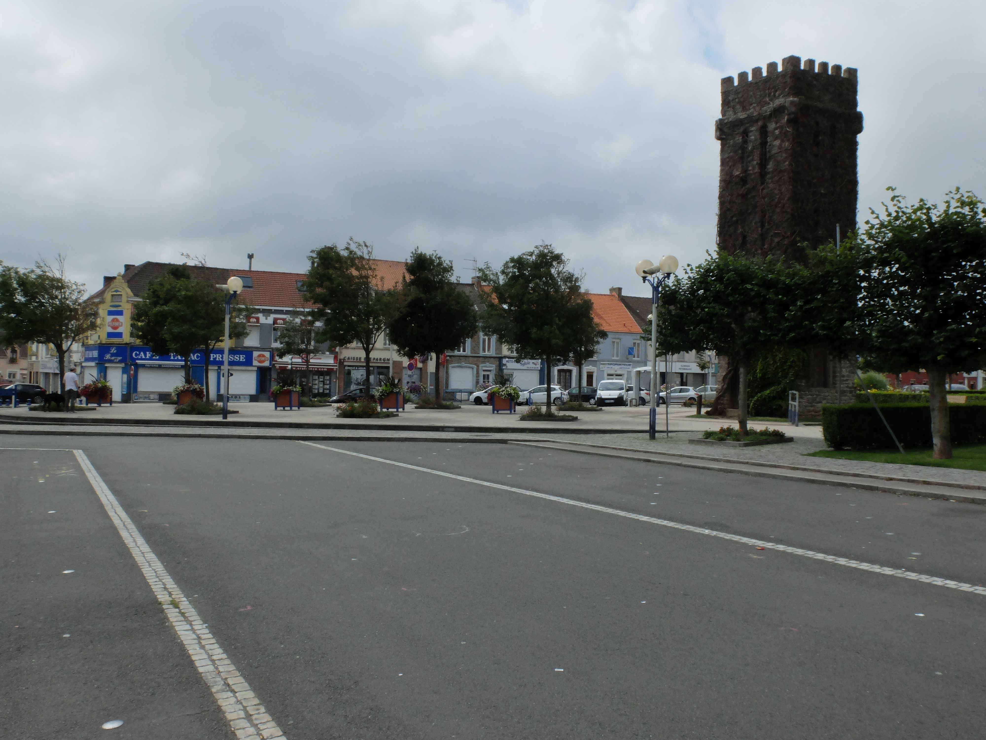 Vue du centre d'Outreau avec la tour de l'ancien château Lonquéty.